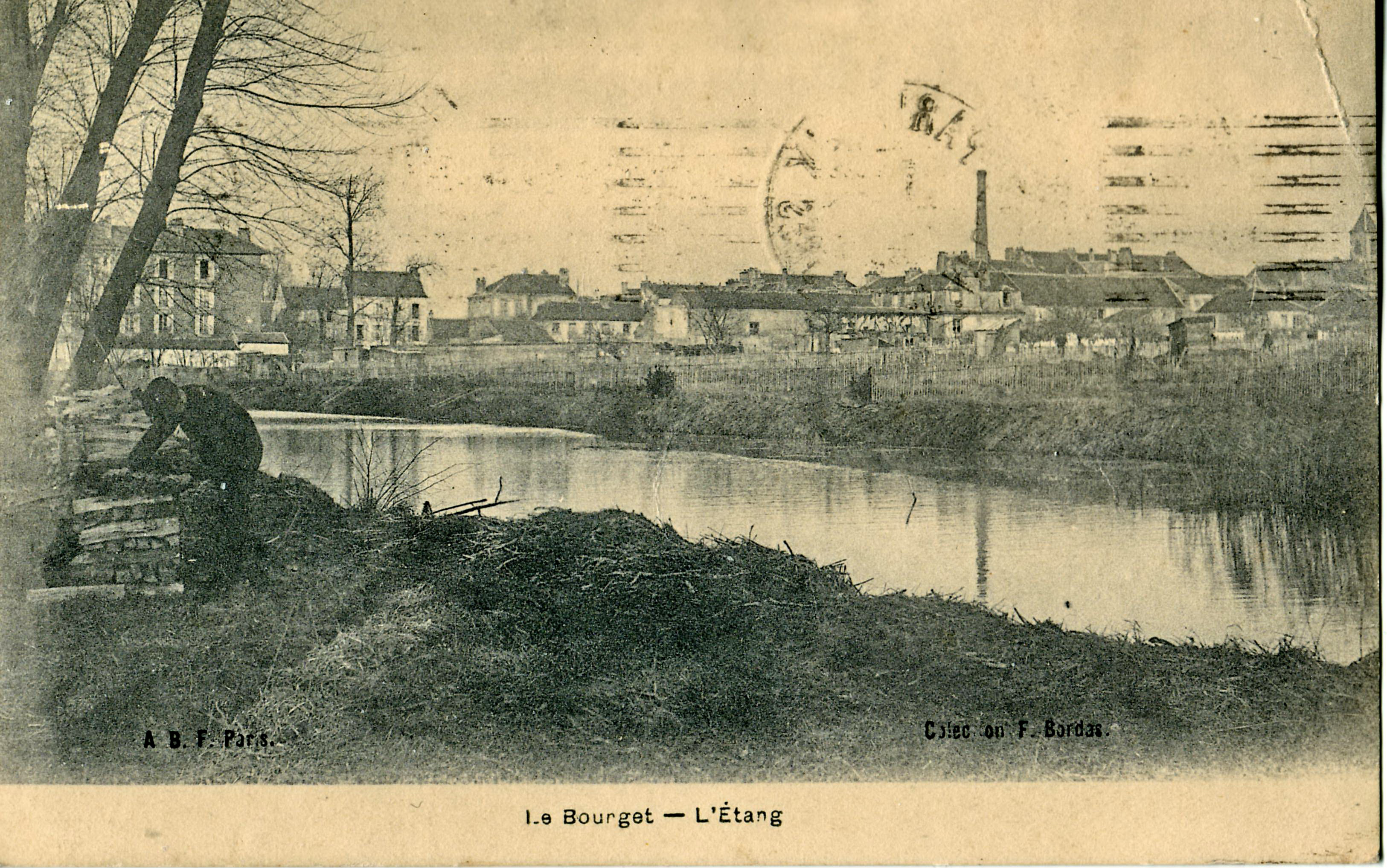 Carte postale ancienne éditée par ABFLE BOURGET (93) - L'Étang